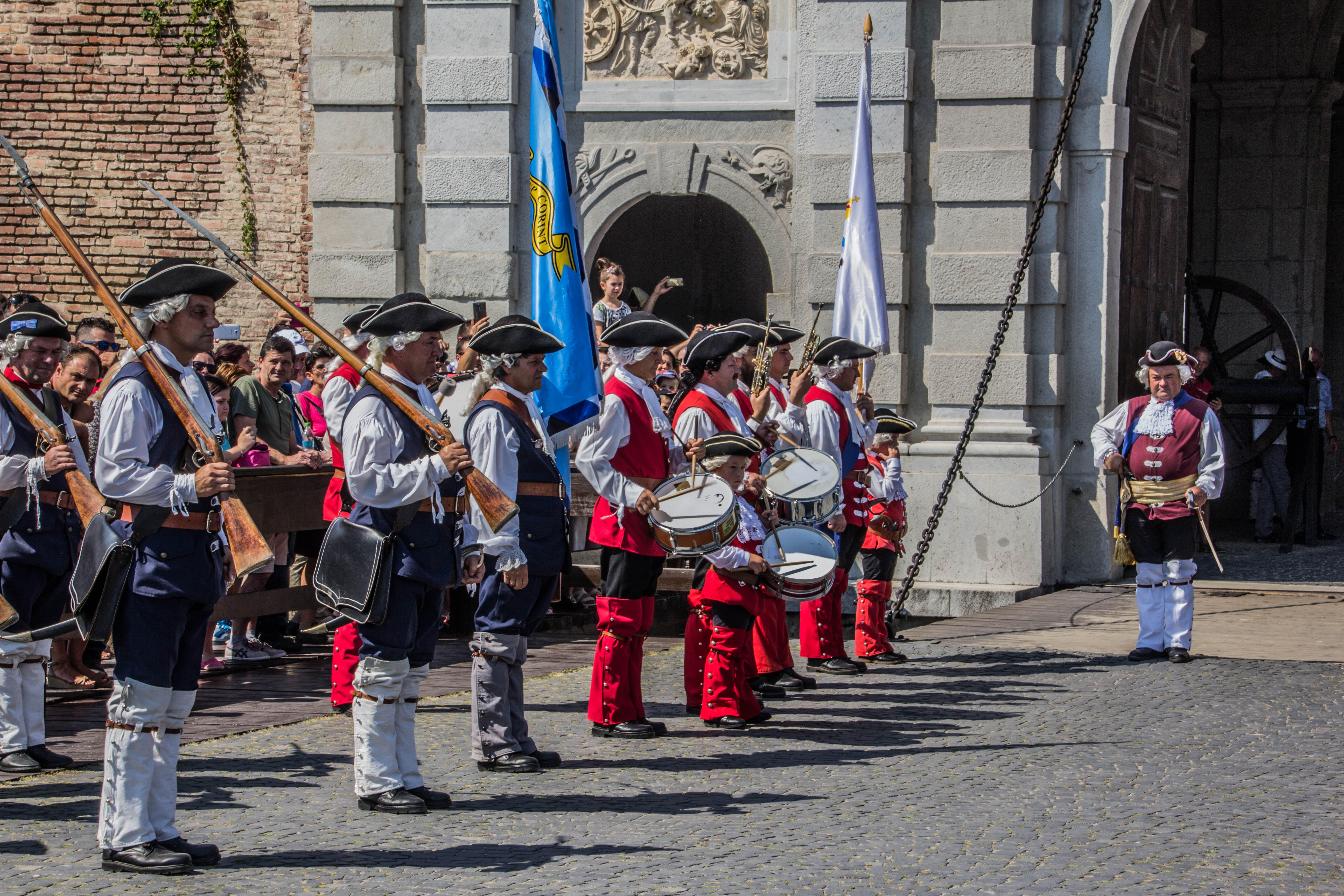 Ansamblul fortificației „Cetatea Alba Carolina”, cu toate componentele: ziduri, bastioane, porți, curtine, raveline, contragărzi, terase bastionare, șanțuri interioare și exterioare, contraescarpe.